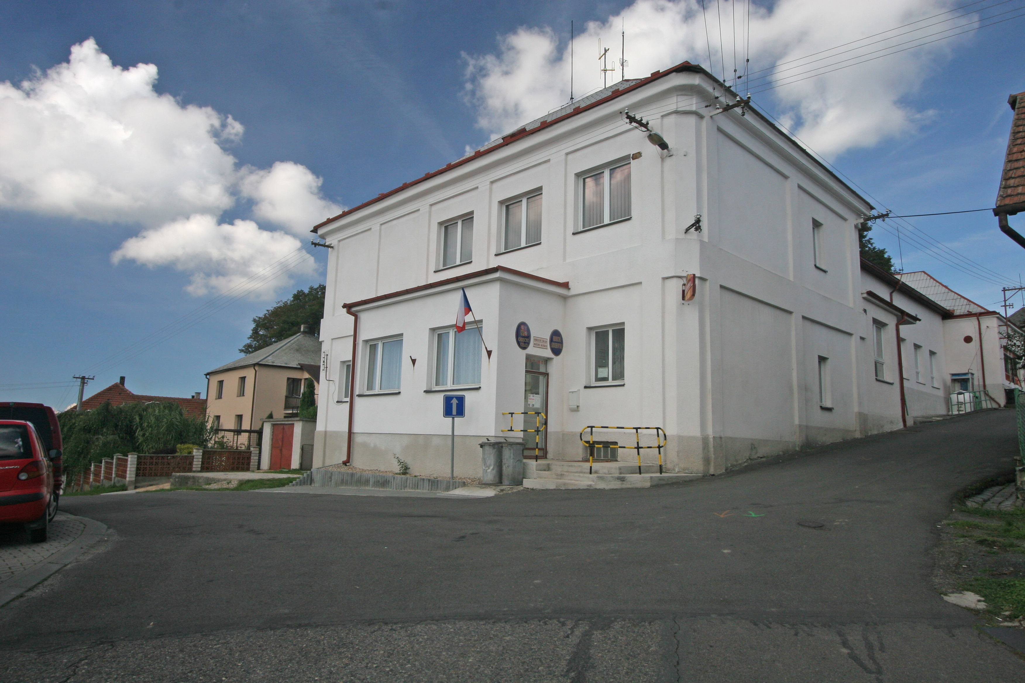 Míčov obecní úřad